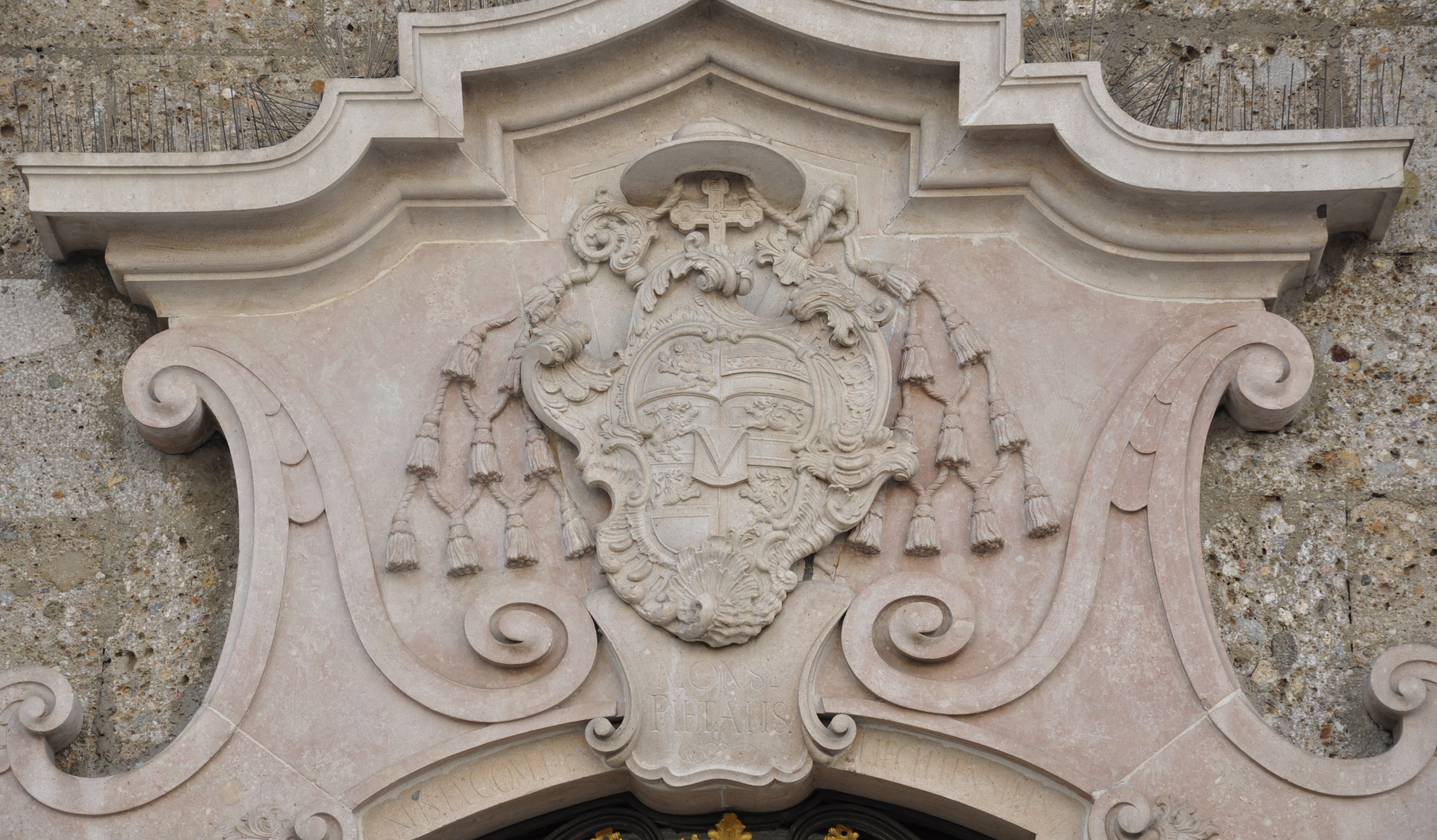 Salzburg, Haus Alter Markt 3, Portal, Detail: Wappen des Erzbischofs Jakob Ernst Graf von Liechtenstein-Kastelkorn